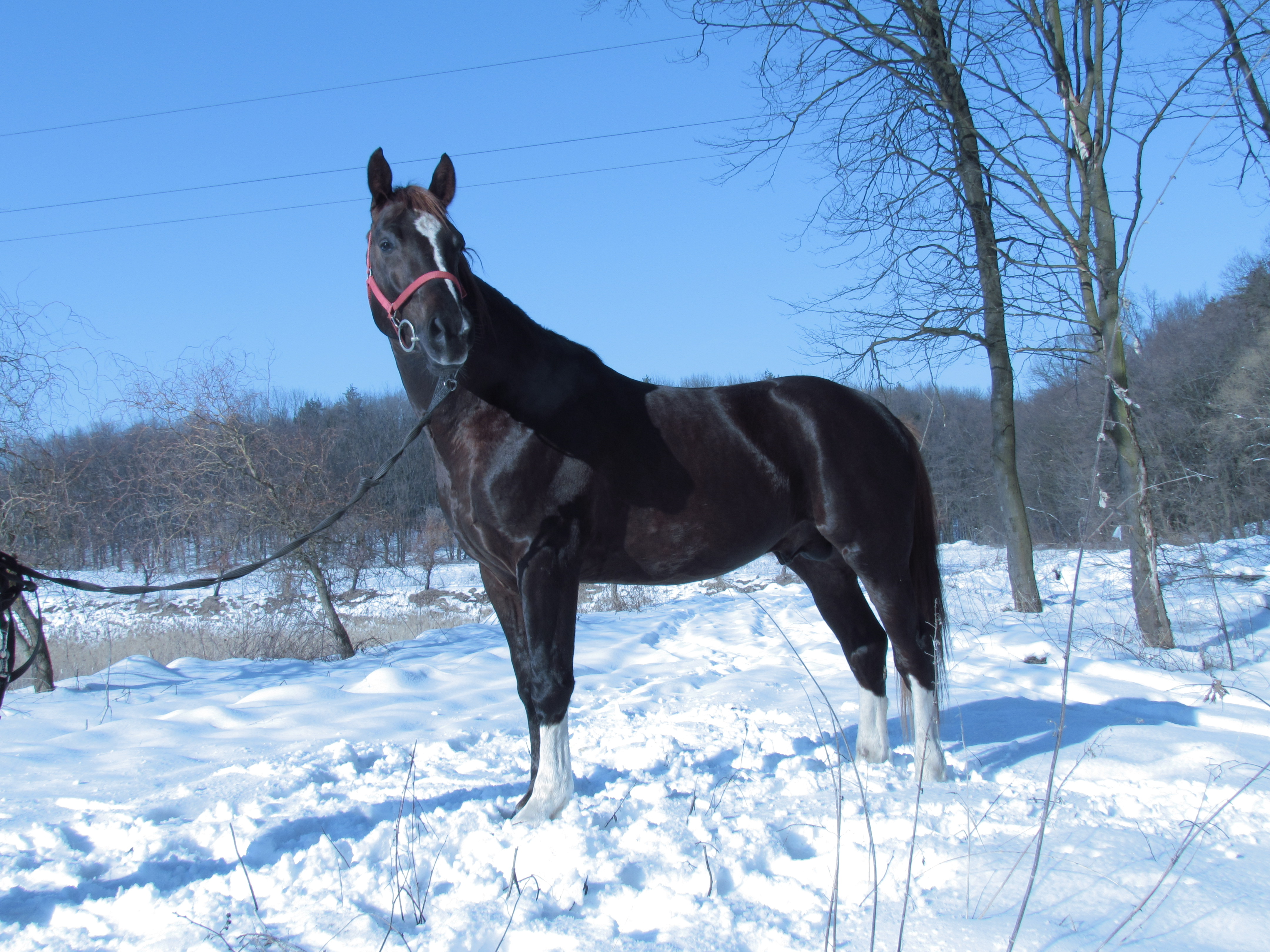 Торійська порода вдосконалена завдяки Роману Максимцю, селекціонеру, іпологу.